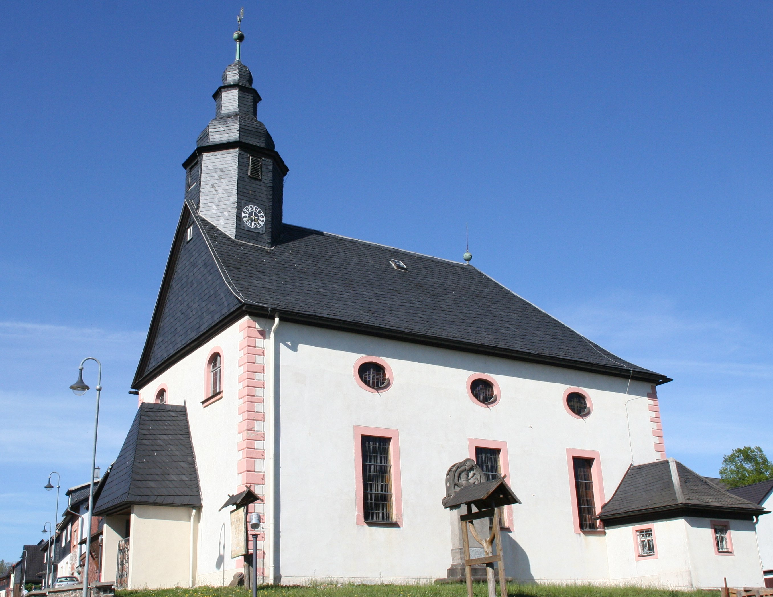 ev. Kirche St. Nikolaus evangelische Kirche in Judenbach, Landkreis Sonneberg